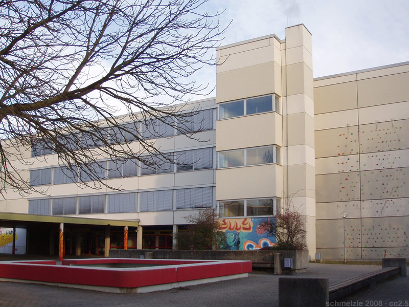 Elly-Heuss-Knapp-Gymnasium in Heilbronn-Böckingen